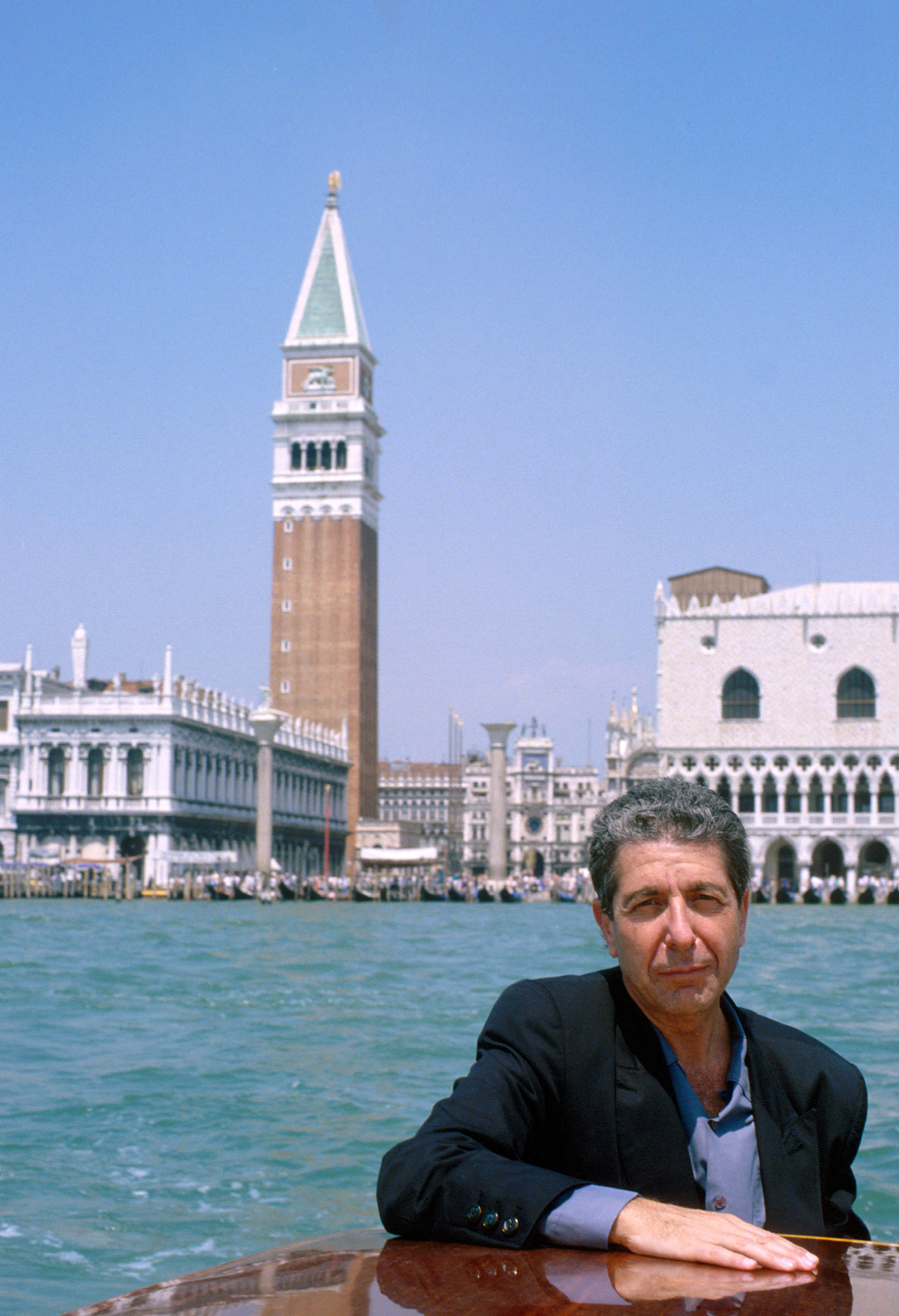 Il cantautore Leonard Cohen a Venezia